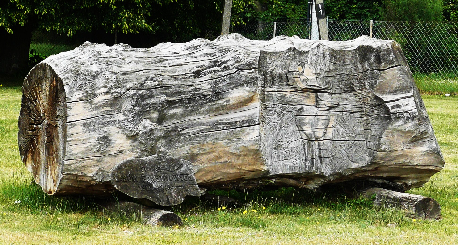 Nadleśnictwo Łopuchówko. Pień przy siedzibie.